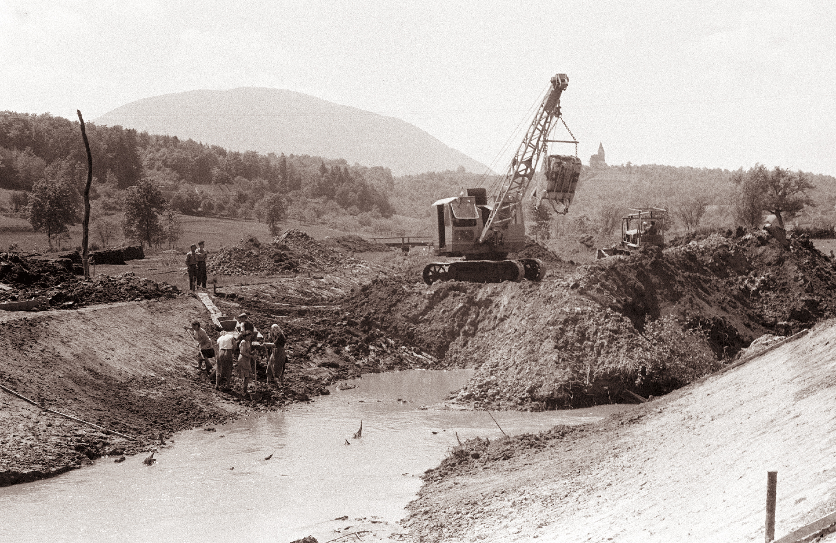 Vodna skupnost Slovenska Bistrica nadaljuje z regulacijo potoka Ložnica